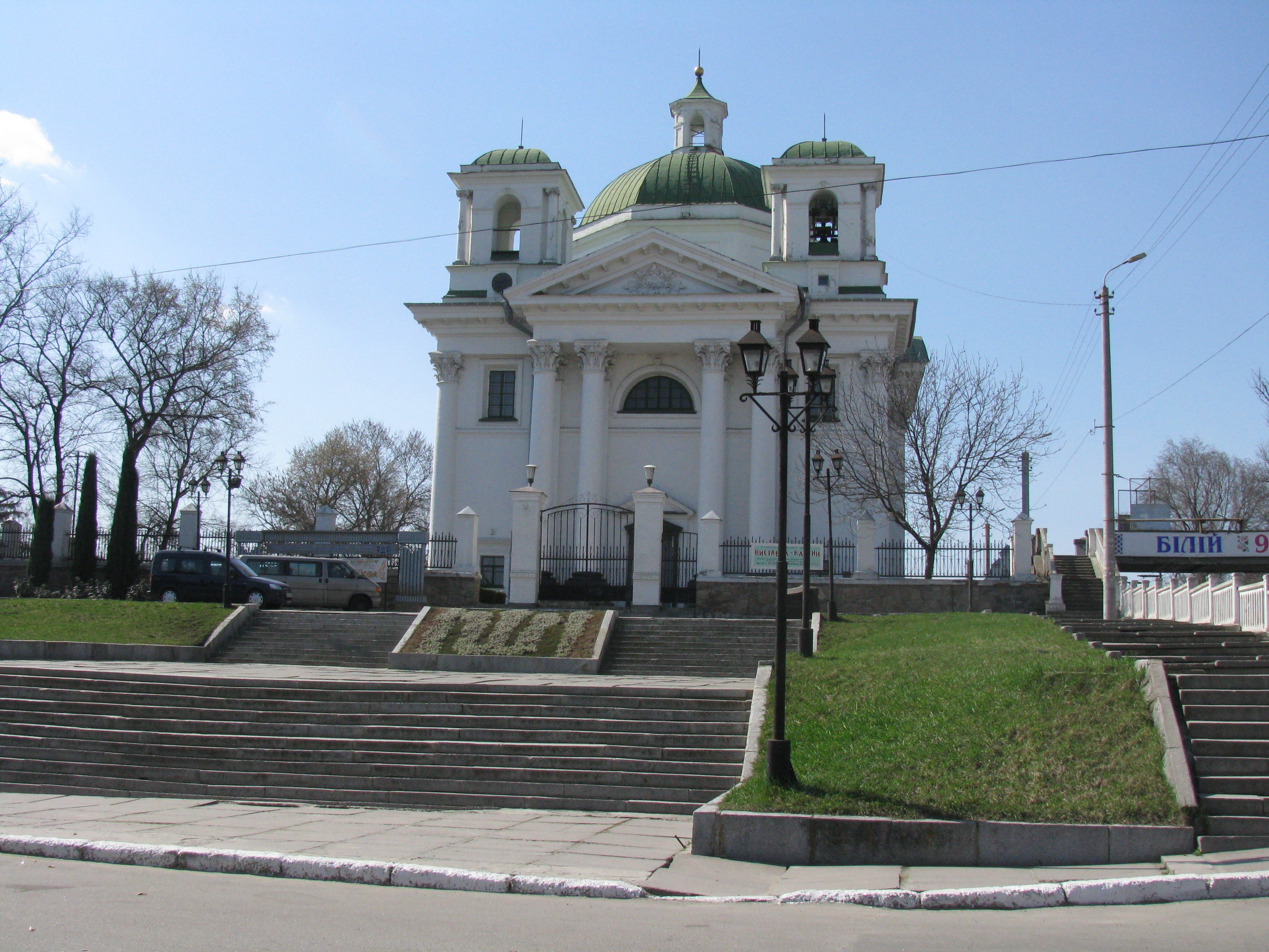 Костел Іоанна Предтечі (мур.), Біла Церква, Соборний майдан, 4